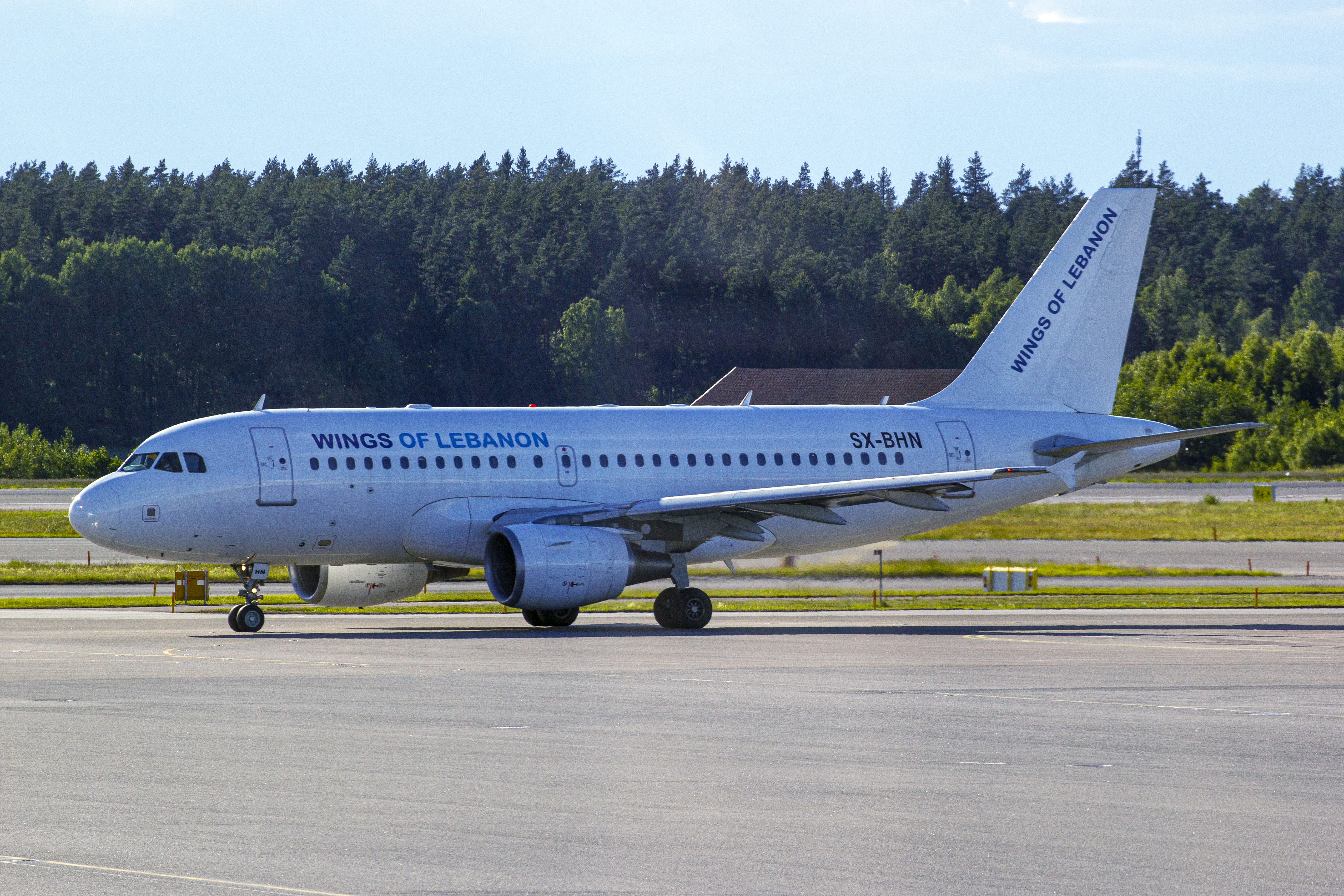 Airbus A319 de Wings of Lebanon no aeroporto de Estocolmo-Arlanda.